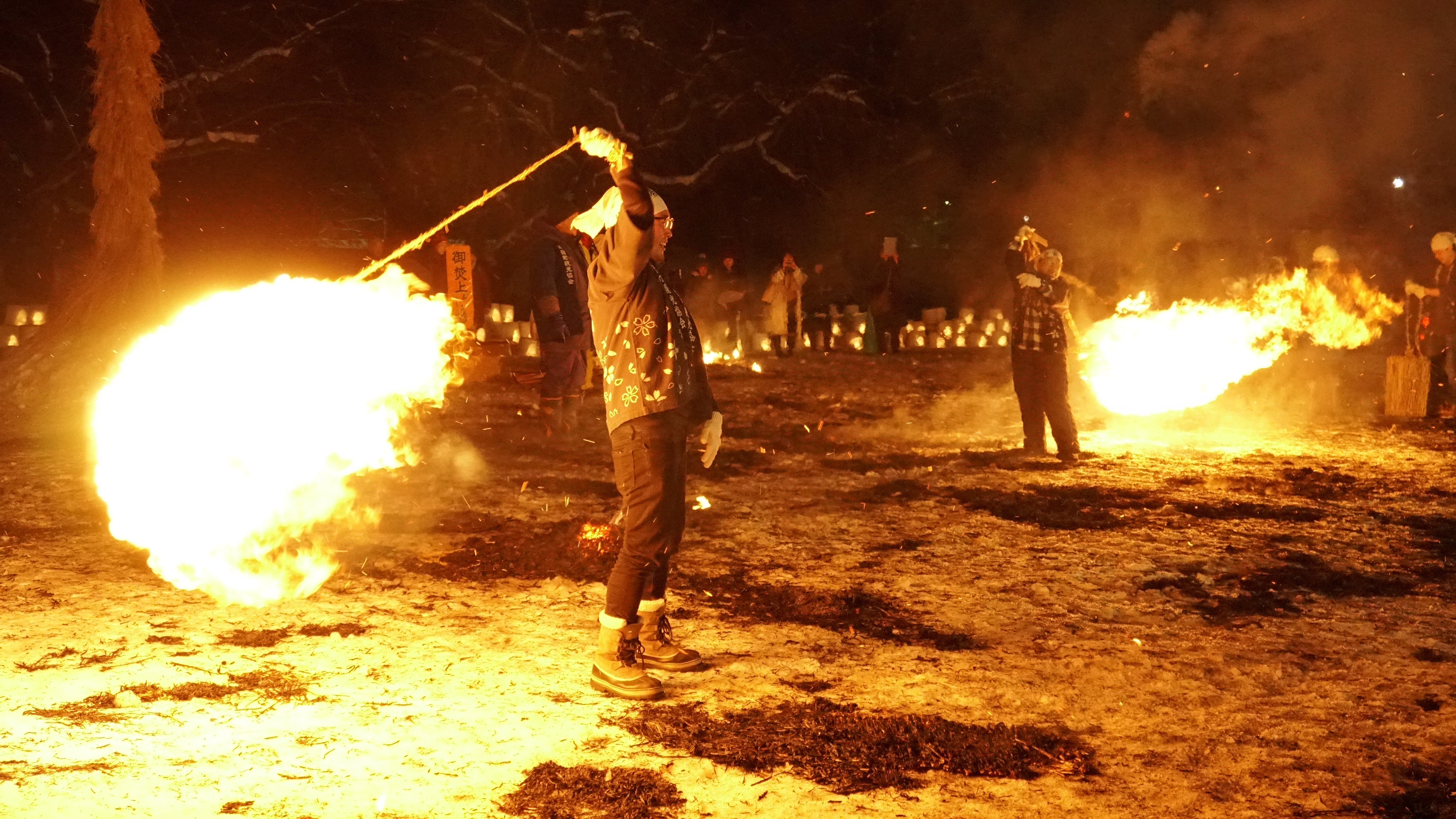 秋田県仙北市角館町で行われる小正月行事・火振りかまくら。着火した炭俵を振り回すことで次第に火が大きくなっていく。豪快かつ幻想的な祭りである。